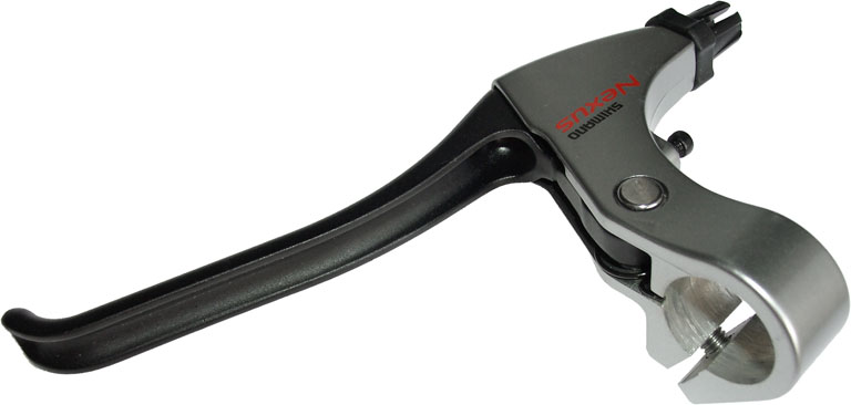 Bremshebel, GNU-FDL, selbst fotografiert